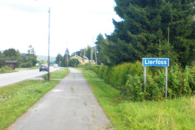 Stedsskiltet som markerer tettstedet Lierfoss vestfra i Aurskog-Høland kommune.